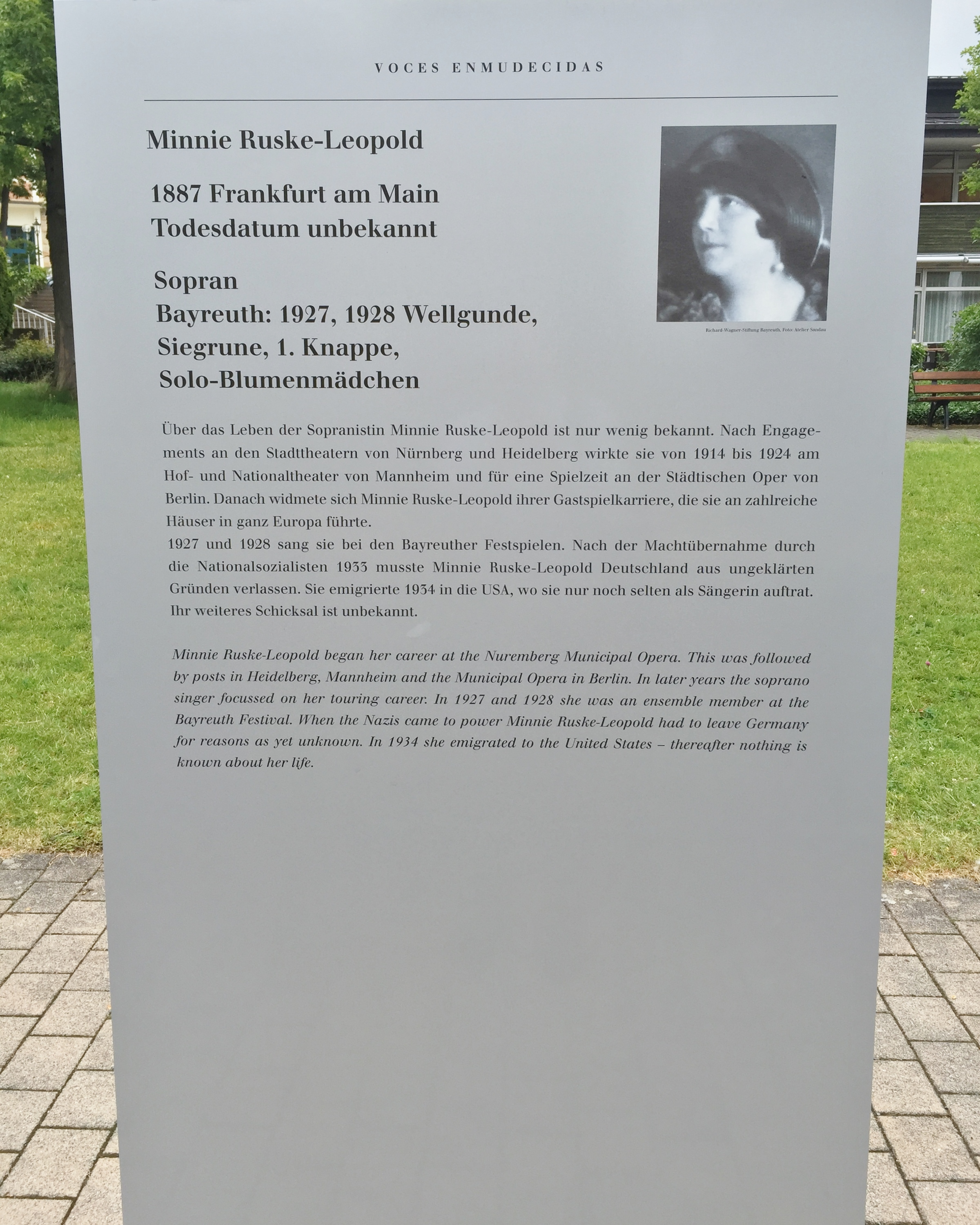 "Verstummte Stimmen - Die Bayreuther Festspiele und die 'Juden' 1876 bis 1945", Ausstellung 2016